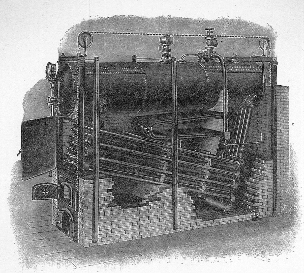 Babcock & Wilcox boiler (Rankin Kennedy, Modern Engines, Vol VI).jpg